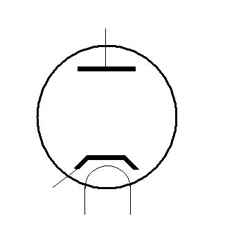 Vacuumdiode schematisch symbool.